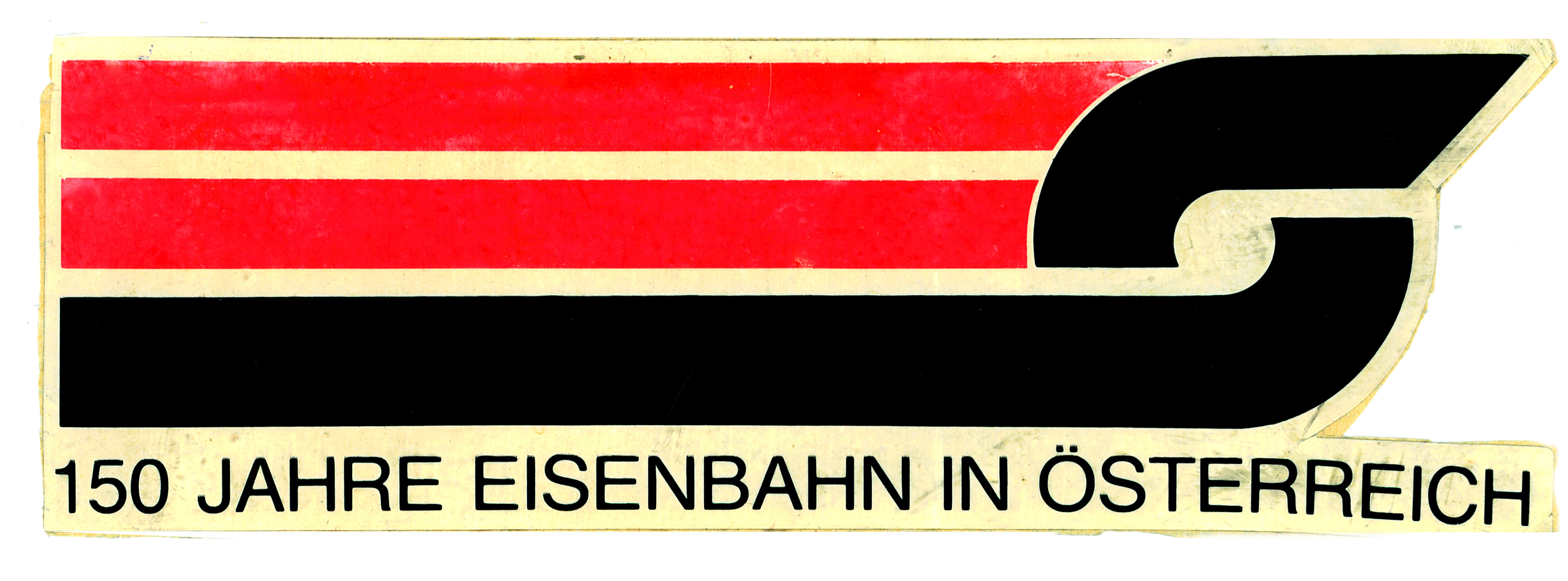 Aufkleber "150 Jahre Eisenbahn in Österreich" anlässlich des Jubiläums 1987